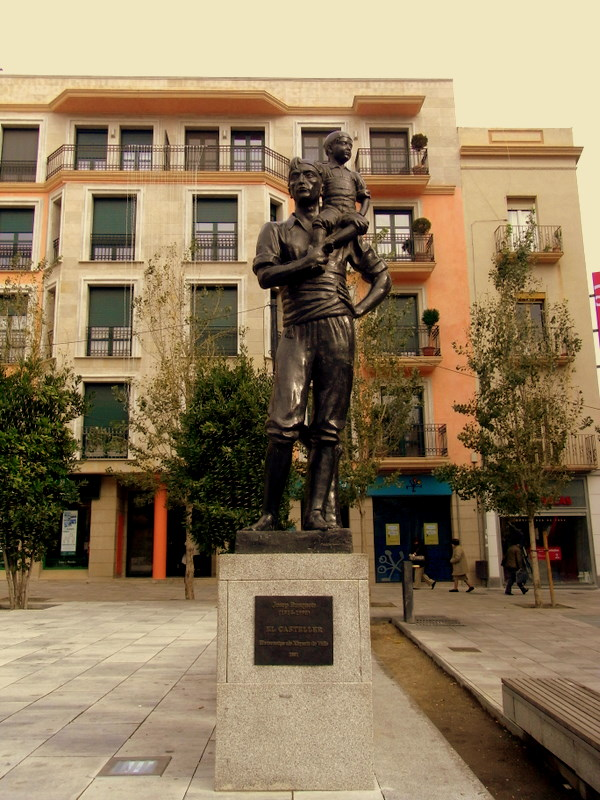 Pl. del Pati, Valls - Estàtua El casteller. No s'ha de confondre amb el Monument als Xiquets de Valls, situat al Passeig dels Caputxins de Valls.